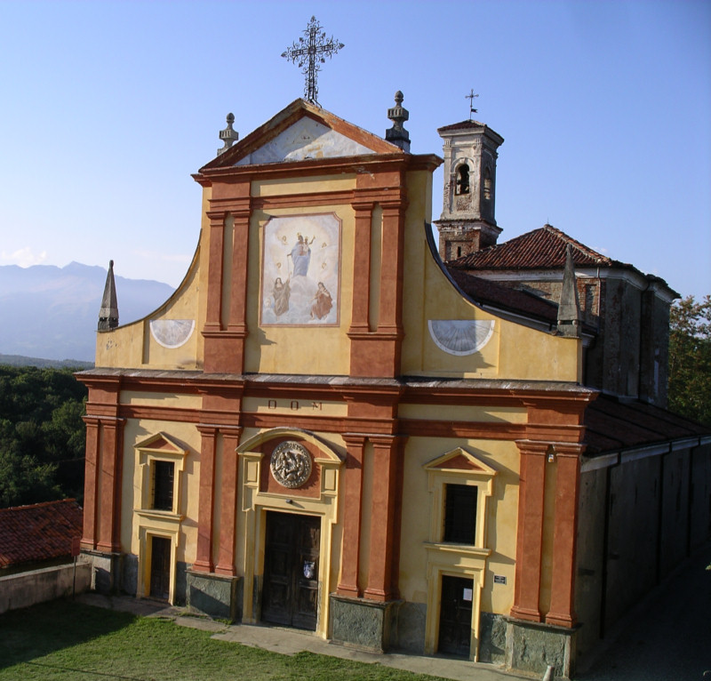 Chiesa di San Giovanni Battista (Chiesa Parrocchiale di Magnano)